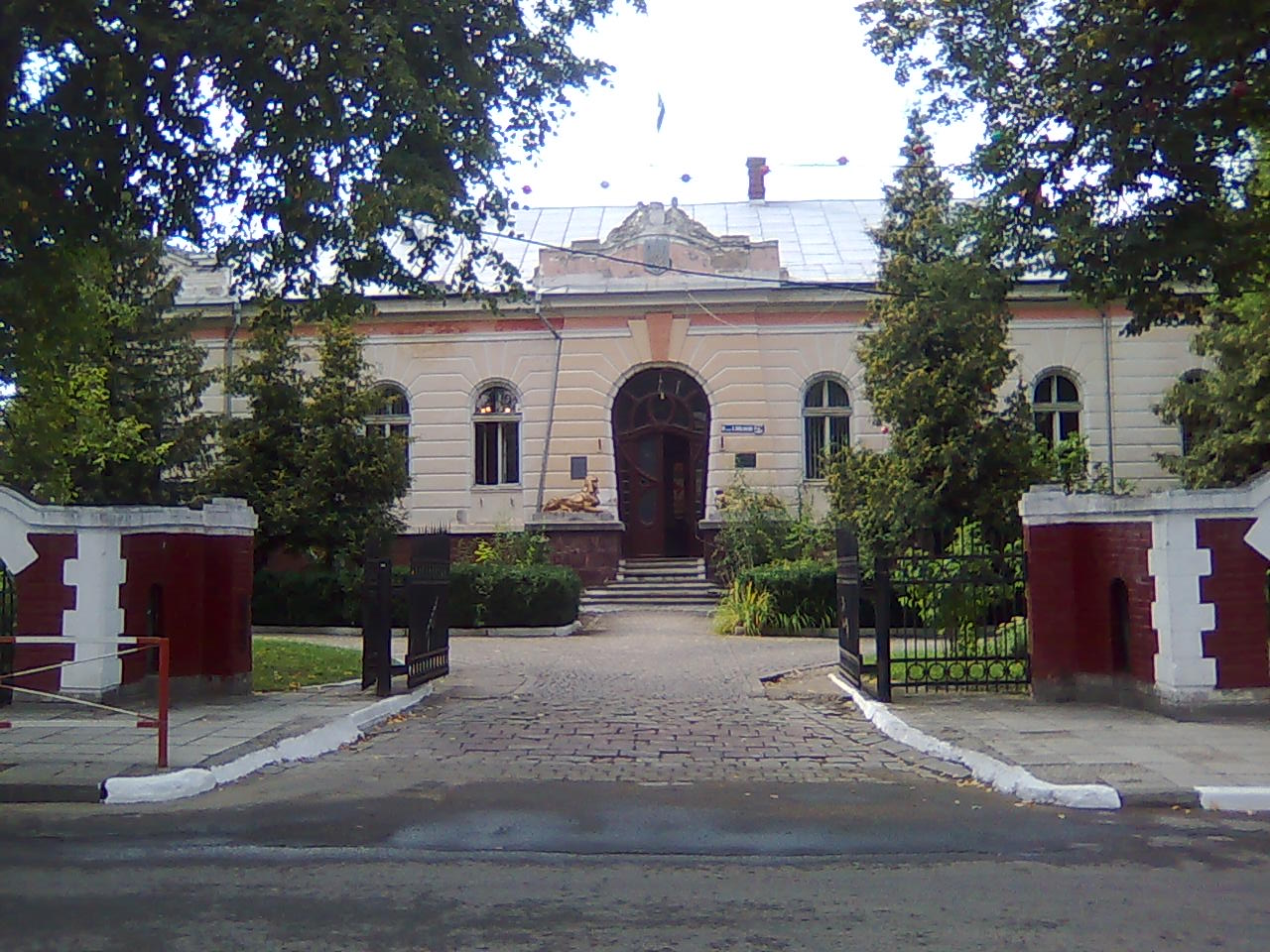 Будинок повітового староства (мур.), Надвірна, вул. Гетьмана Мазепи, 29